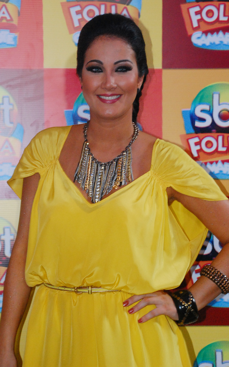 A apresentadora Helen Ganzarolli.